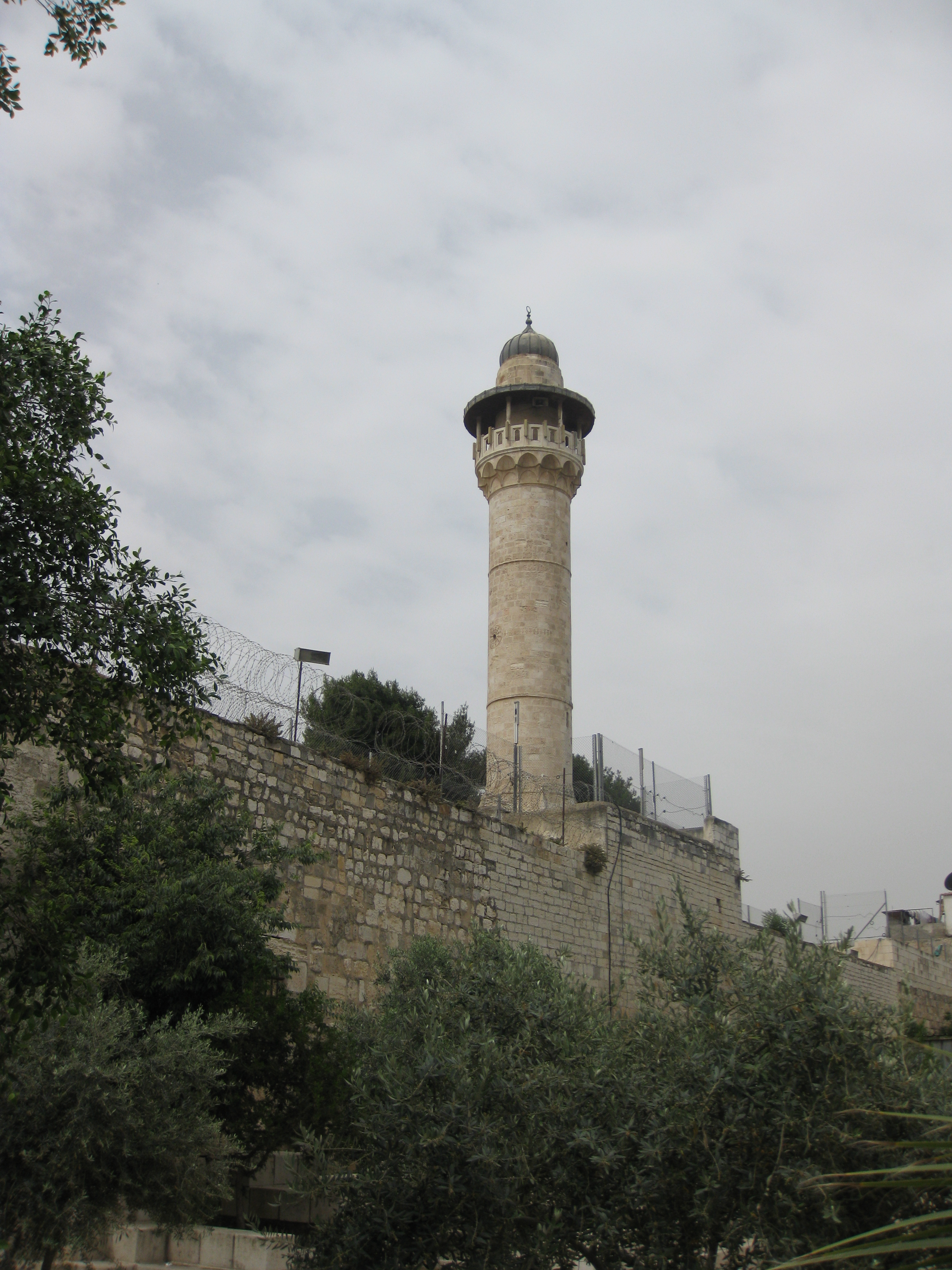 Temple Mount - Tribes Tower הר הבית - צריח השבטים